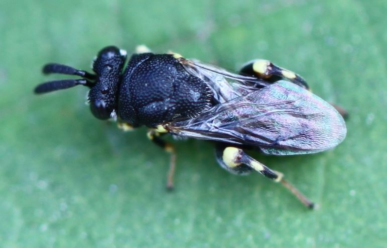 Erzwespe Brachymeria cf. minuta am 12. Juli 2018 in der Schwetzinger Hardt